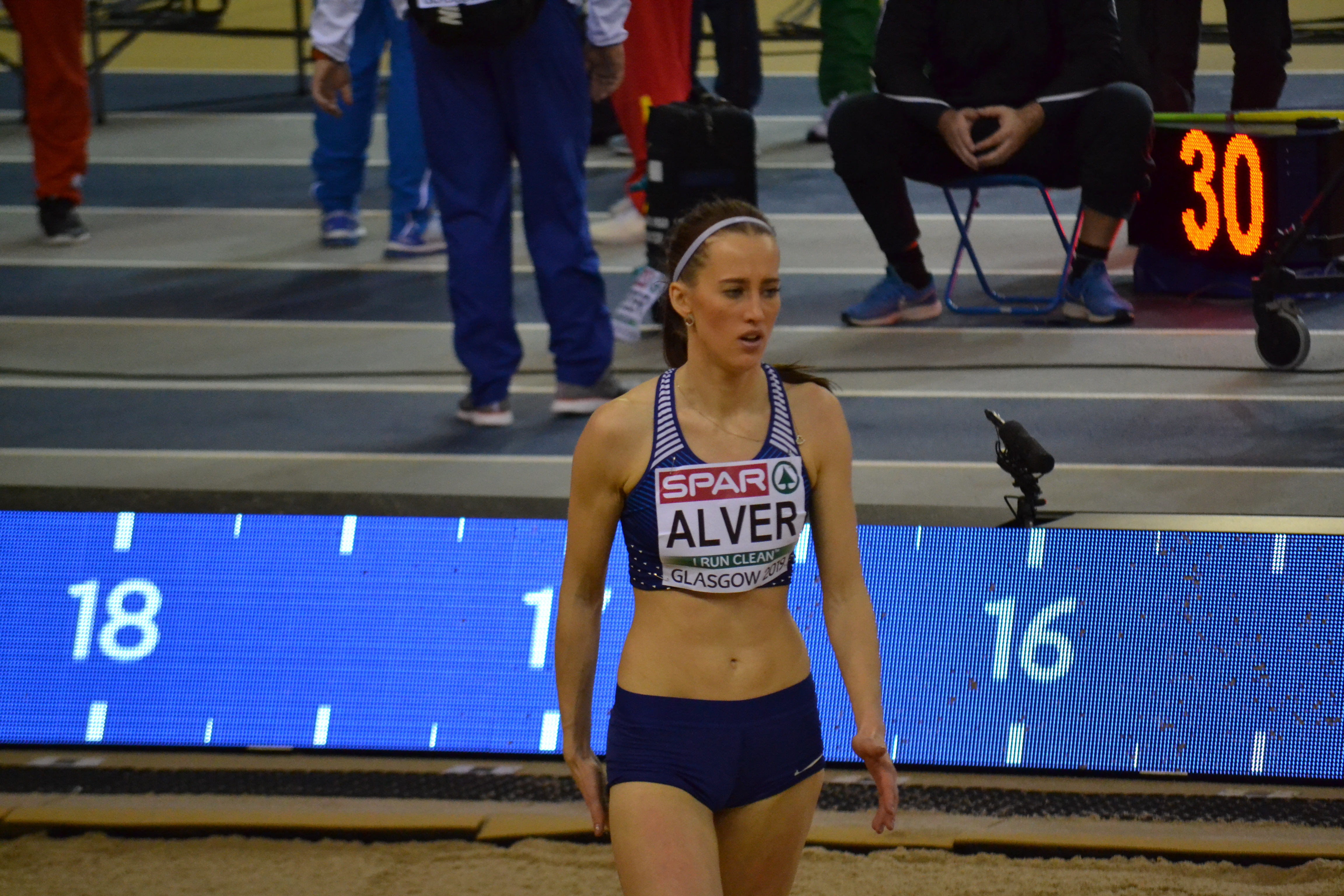 Tähti Alver